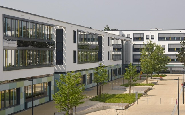 Schulhof der May-Eyth-Schule Dreieich